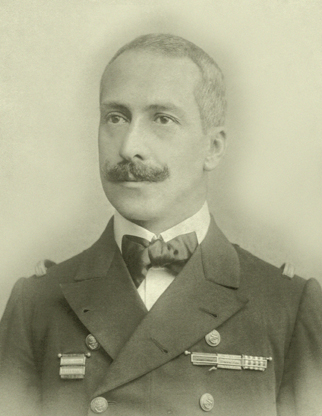 Alfredo Cardoso de Soveral Martins (1868-1938), oficial da Armada Real de Portugal, que foi governador da Guiné e de Timor. Foto de 1903.